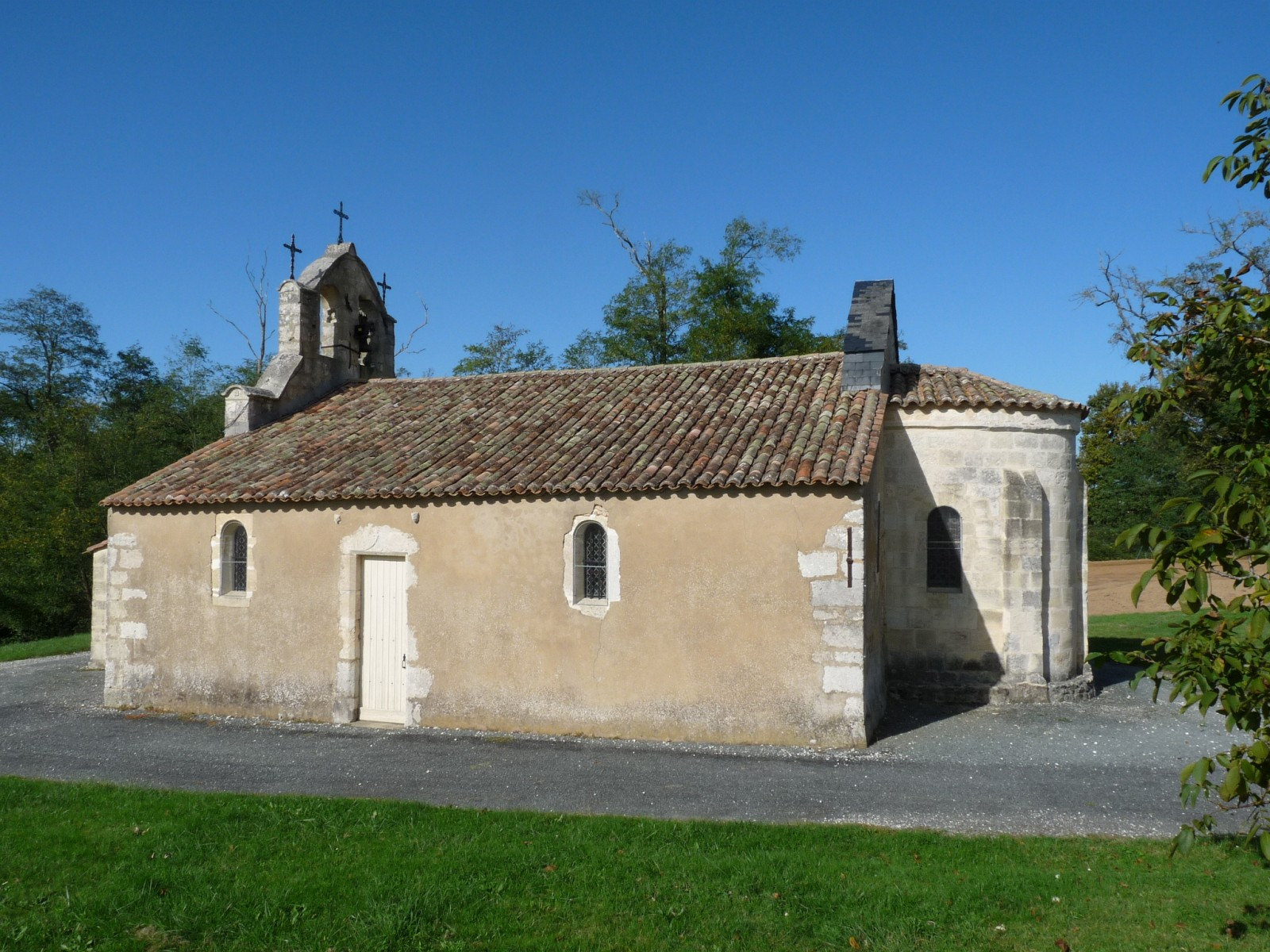 Eglise de Saint-Trojan, Gironde, France